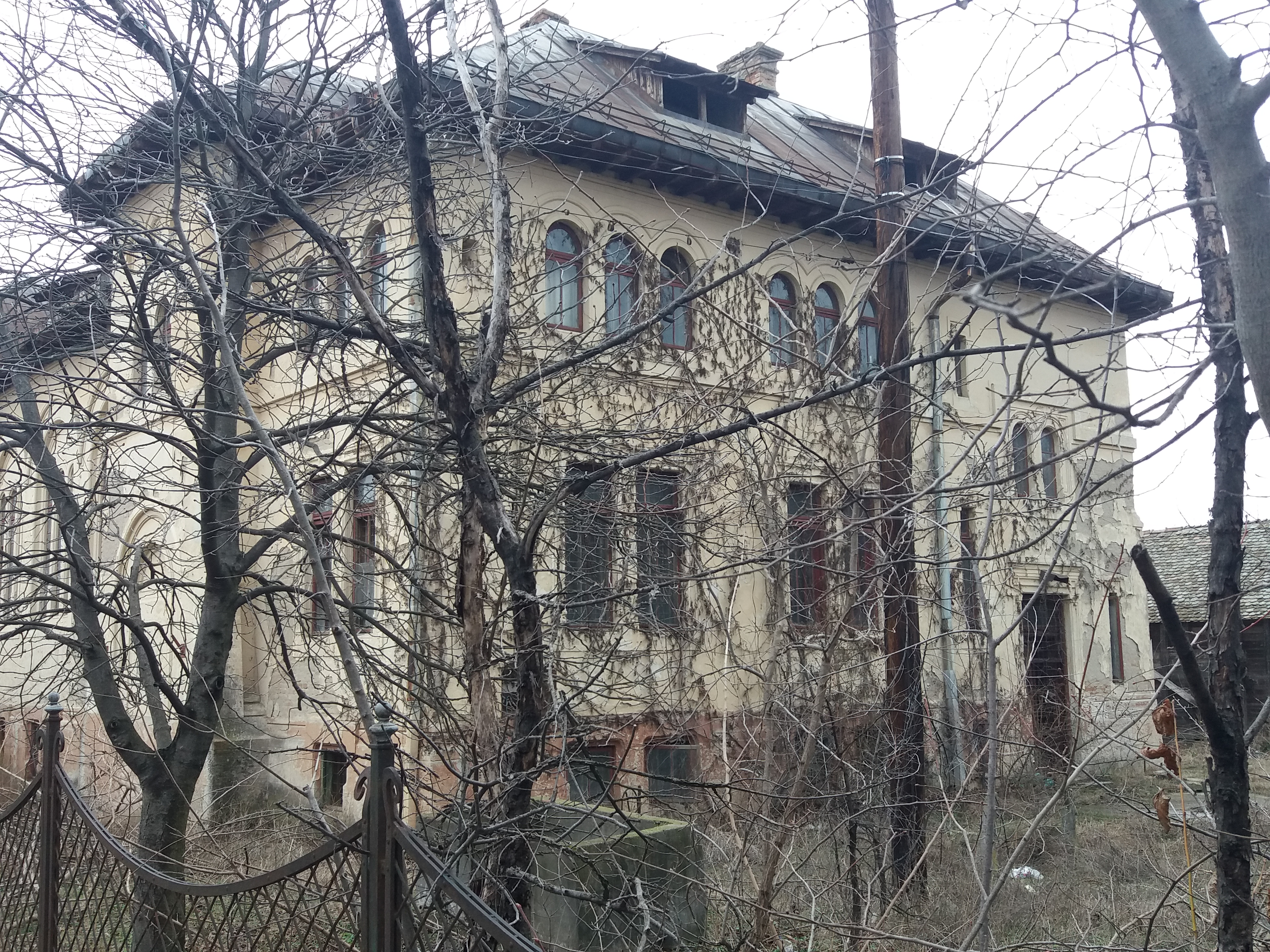 Vechea clădire a Poștei din Calafat.